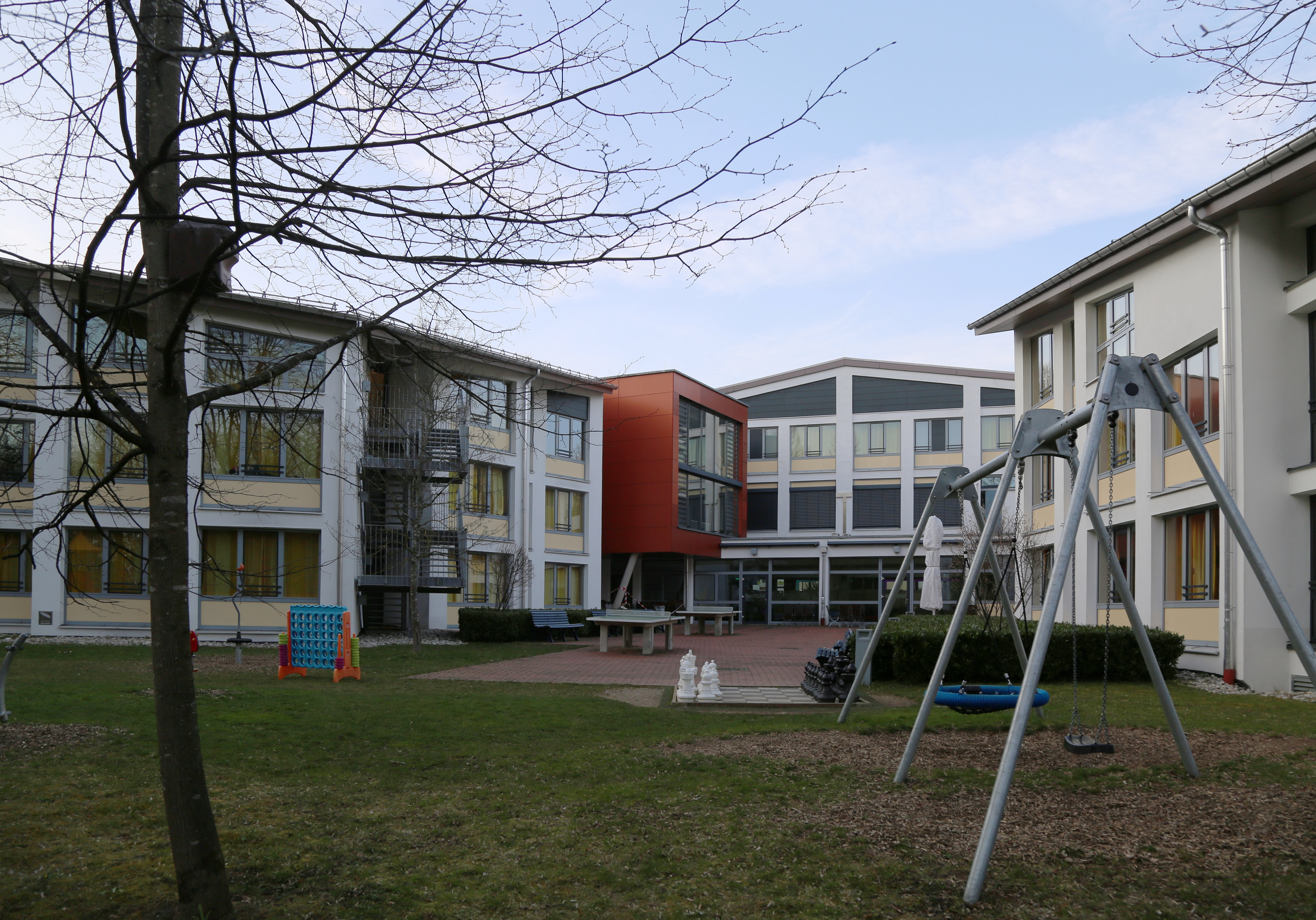 Jugendgästehaus München-Thalkirchen des Deutschen Jugendherbergswerks, erbaut 1974 Architekt Theo Steinhauser